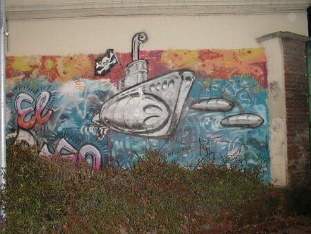 Il graffito di Luca Bortolusso al Fenix